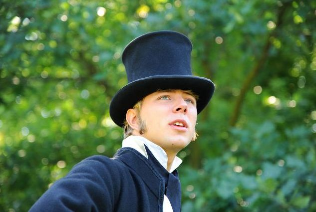 Benjamin Trinks bei den Dreharbeiten zum Film "Die Meuterei auf der Bounty"